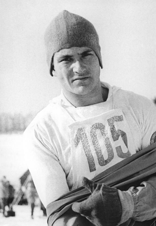 Dieter Ritter Zentralbild 26.2.1963 XIV. Deutsche Meisterschaften in den Nordischen Disziplinen Die XIV. deutschen Skimeisterschaften in den Nordischen Disziplinen wurden vom 20.-24. Februar 1963 in Klingenthal-Erzgebirge ausgetragen. UBz: Der Biathlon-Kämpfer Dieter Ritter (SG Dynamo Zinnwald) schlug sich unter der Langlauf-Elite ganz hervorragend. Mit zwei 2. Plätzen im 30-km und 15-km-Langlauf wurden die Leistungen Ritters belohnt.